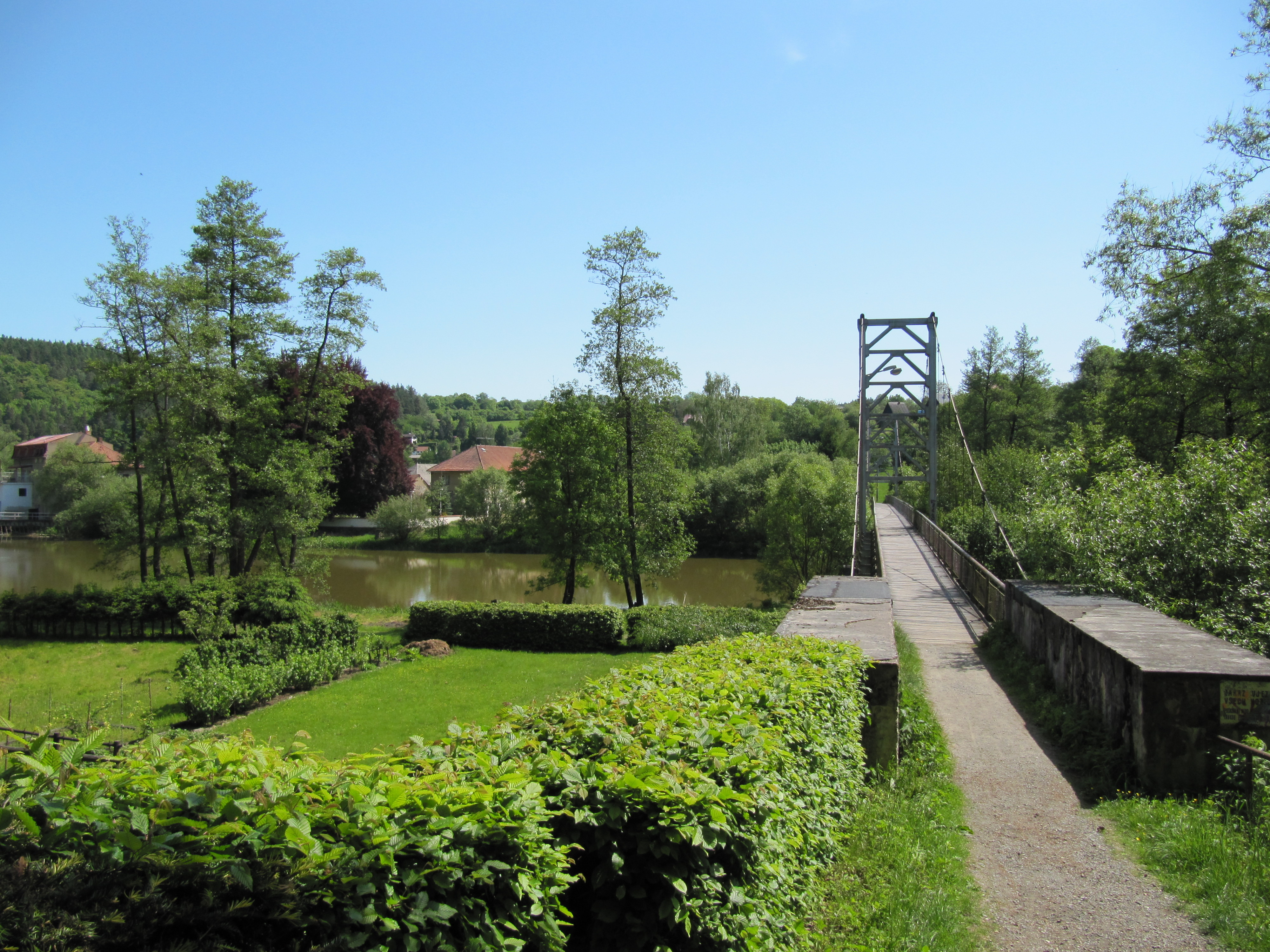 Samopše